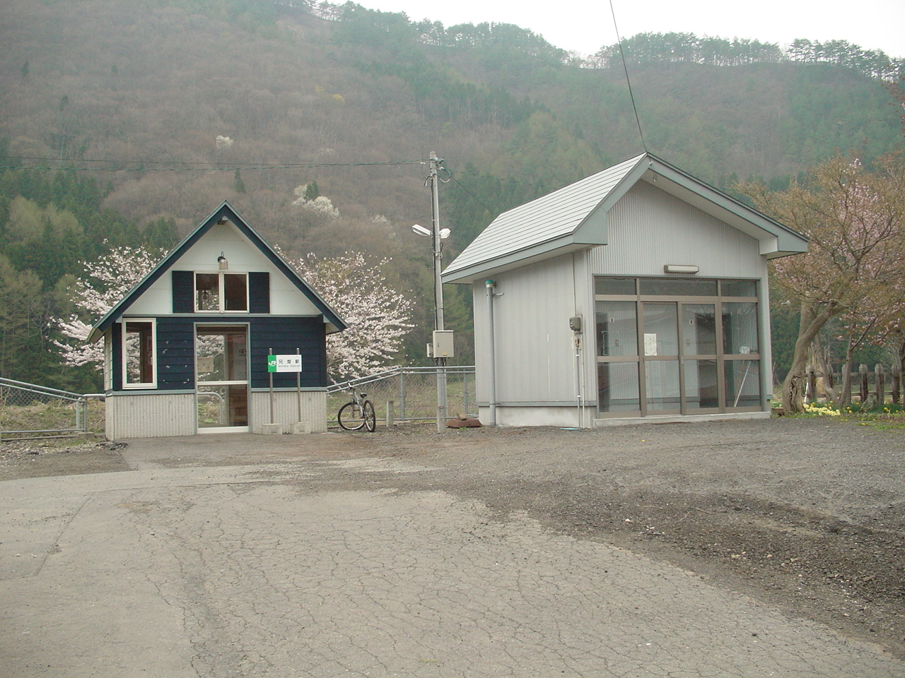 （兄畑駅）